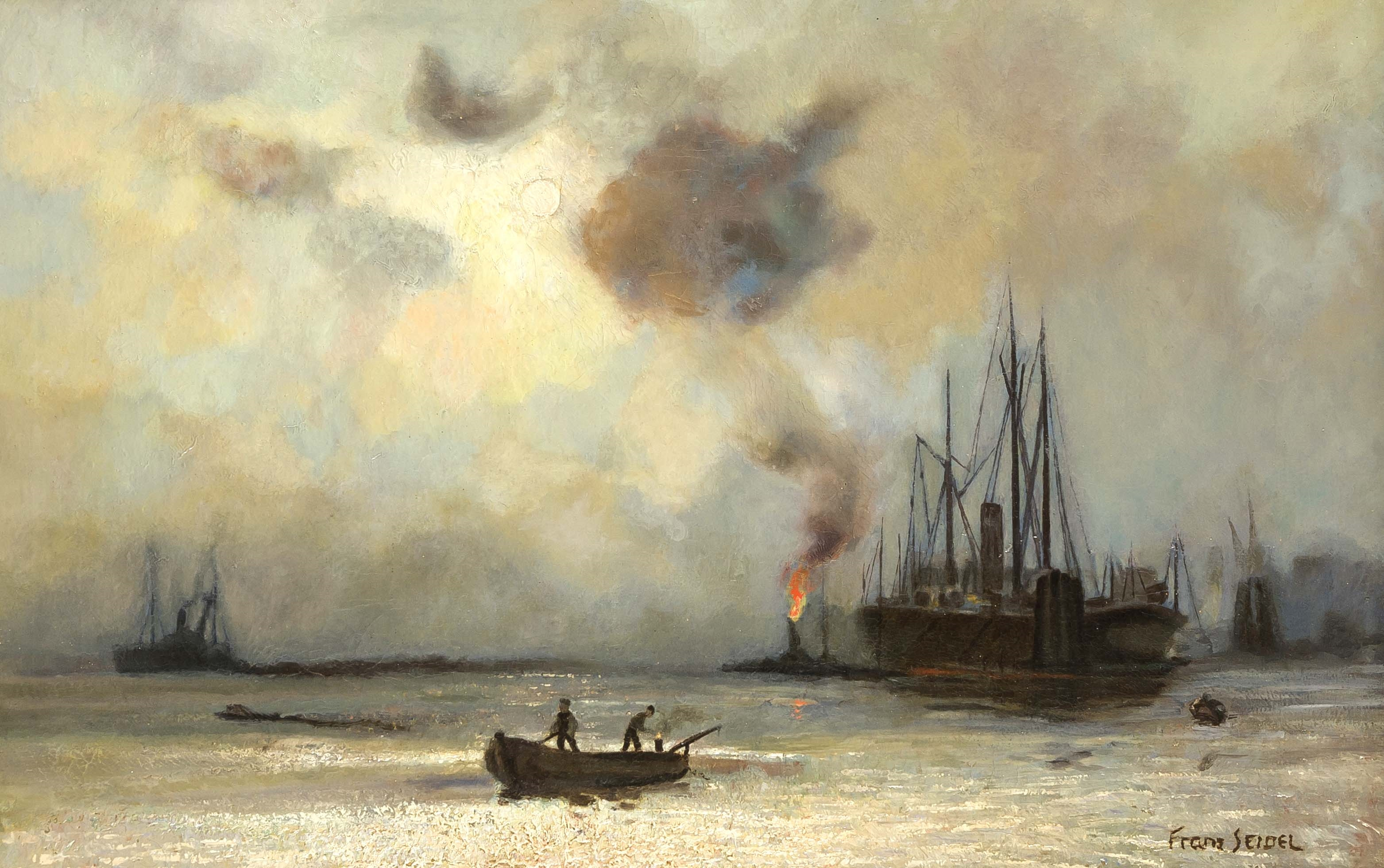 Nächtliche Hafenszene unter dem Vollmond